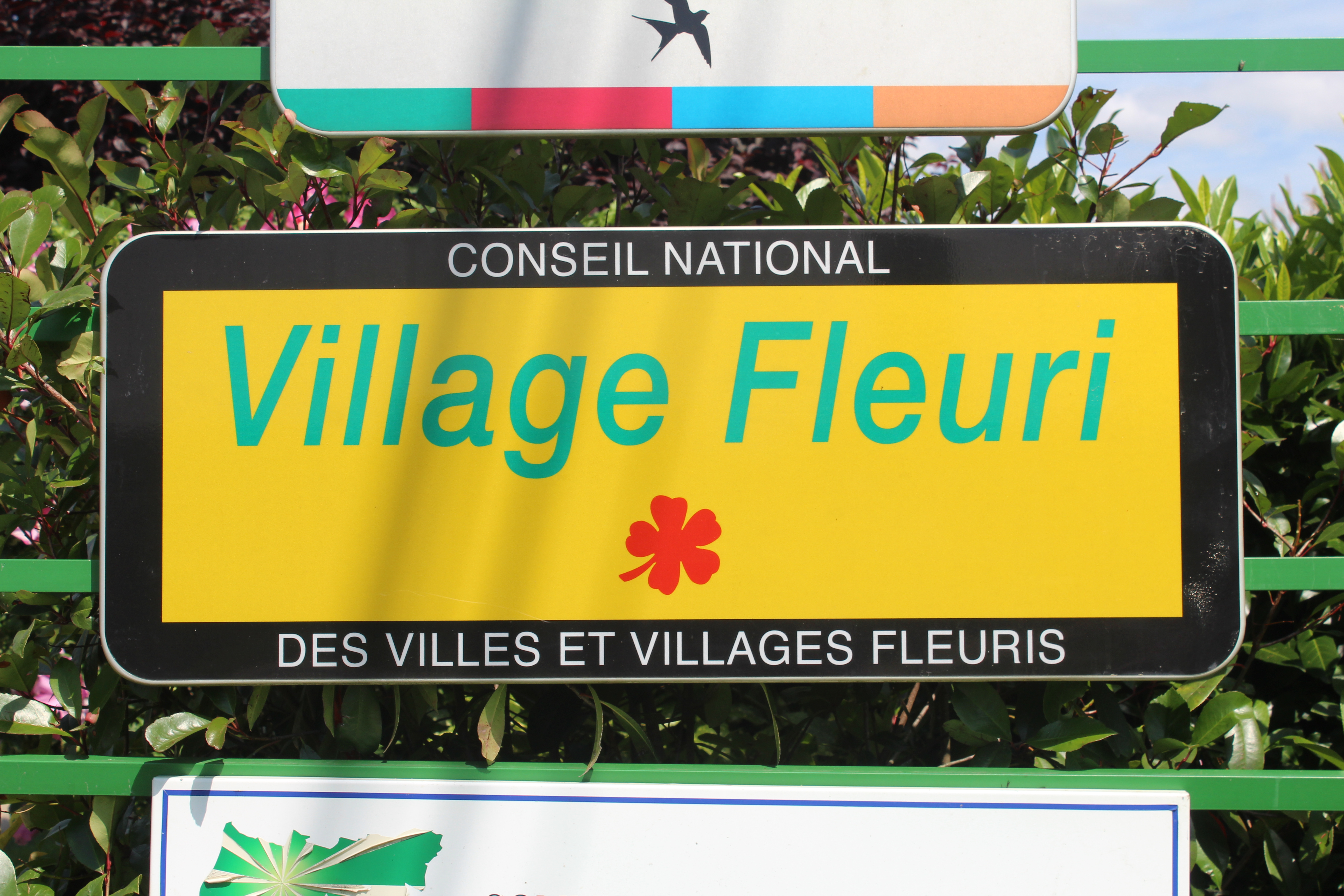 Panneau indiquant la fleur de Bey dans l'Ain.